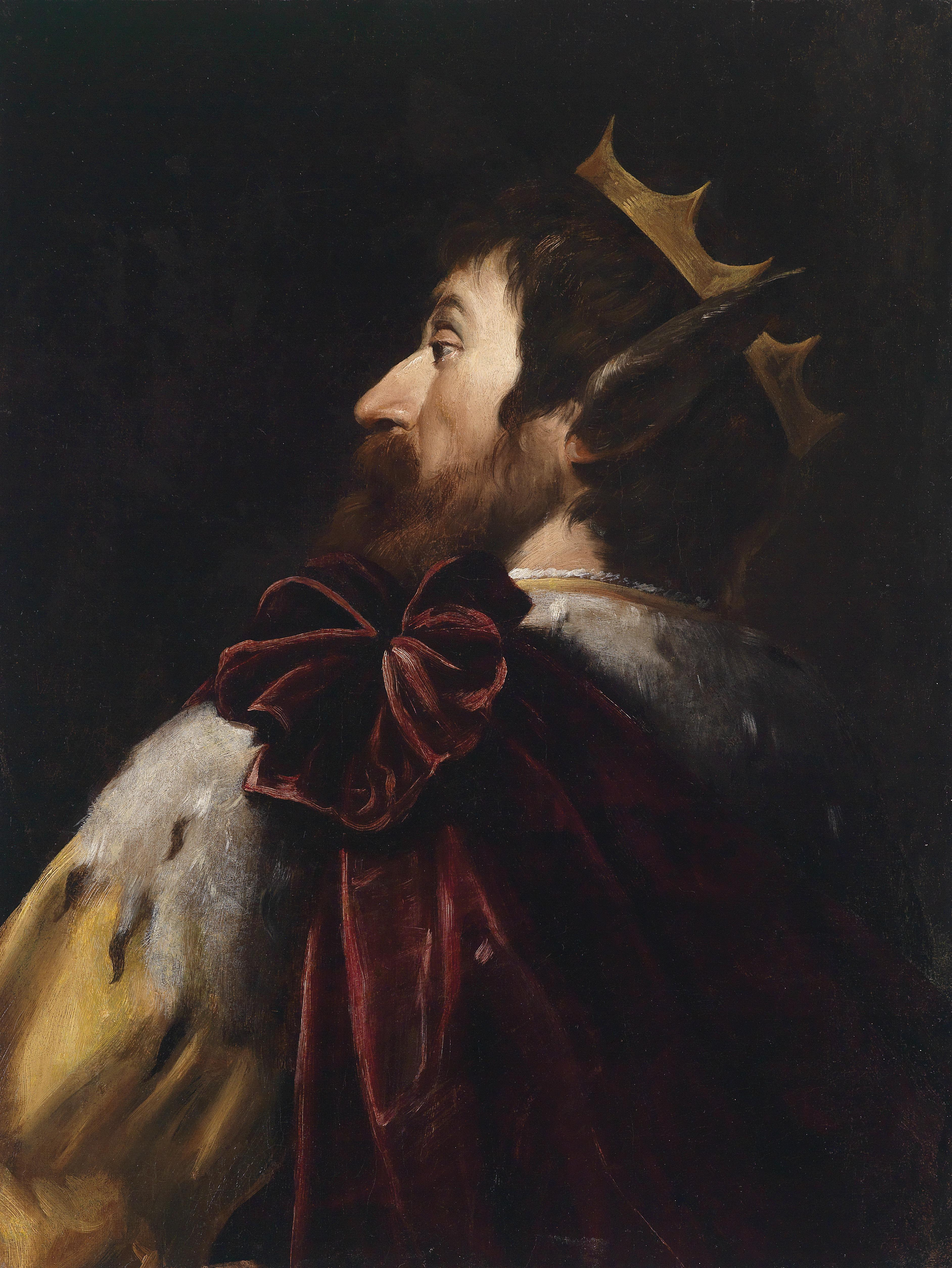 König Midas, Öl auf Leinwand, 71 x 54 cm